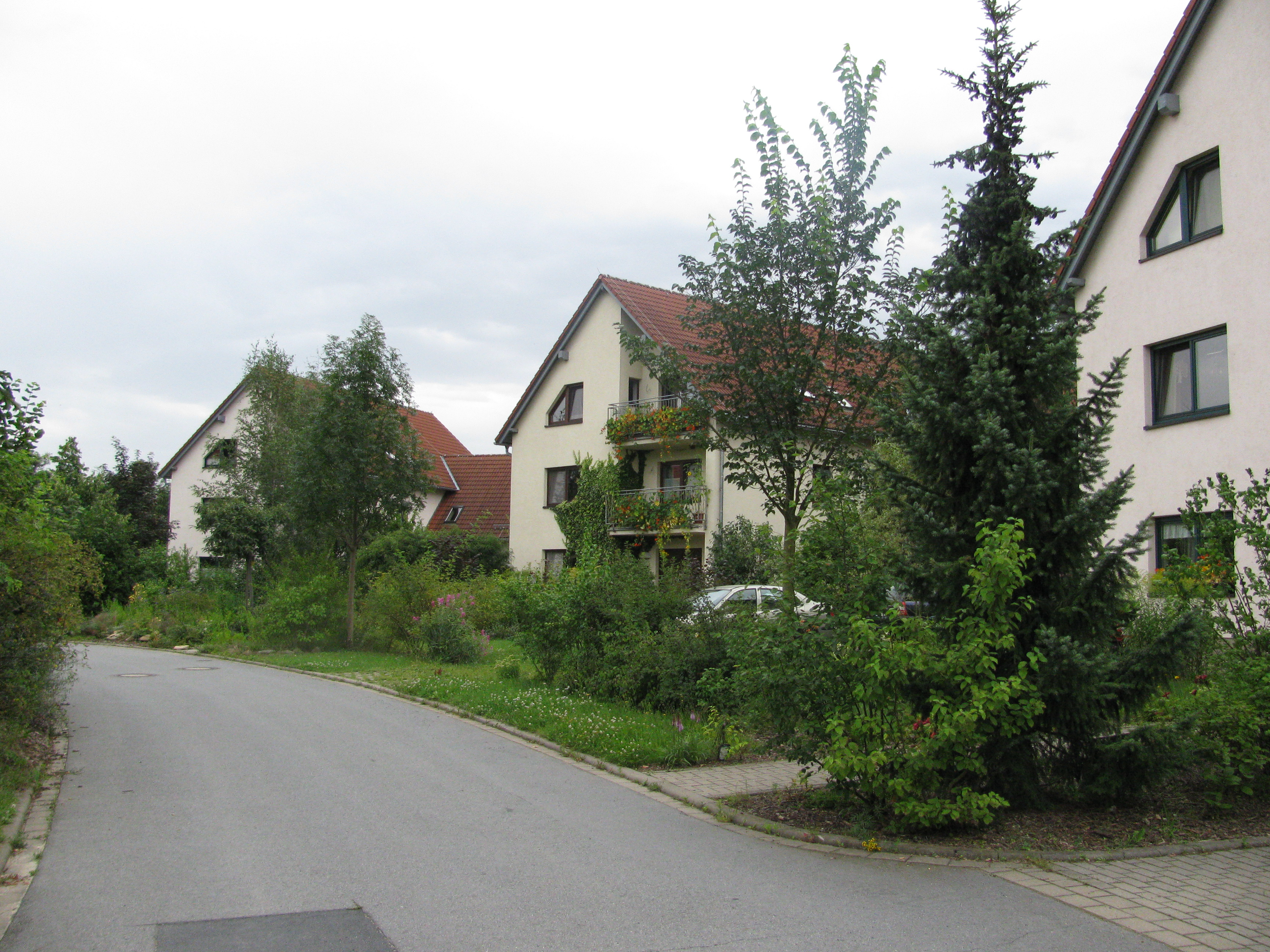 Gebäude im Albert-Schweitzer-Kinderdorf in Steinbach, Gemeinde Moritzburg, Sachsen